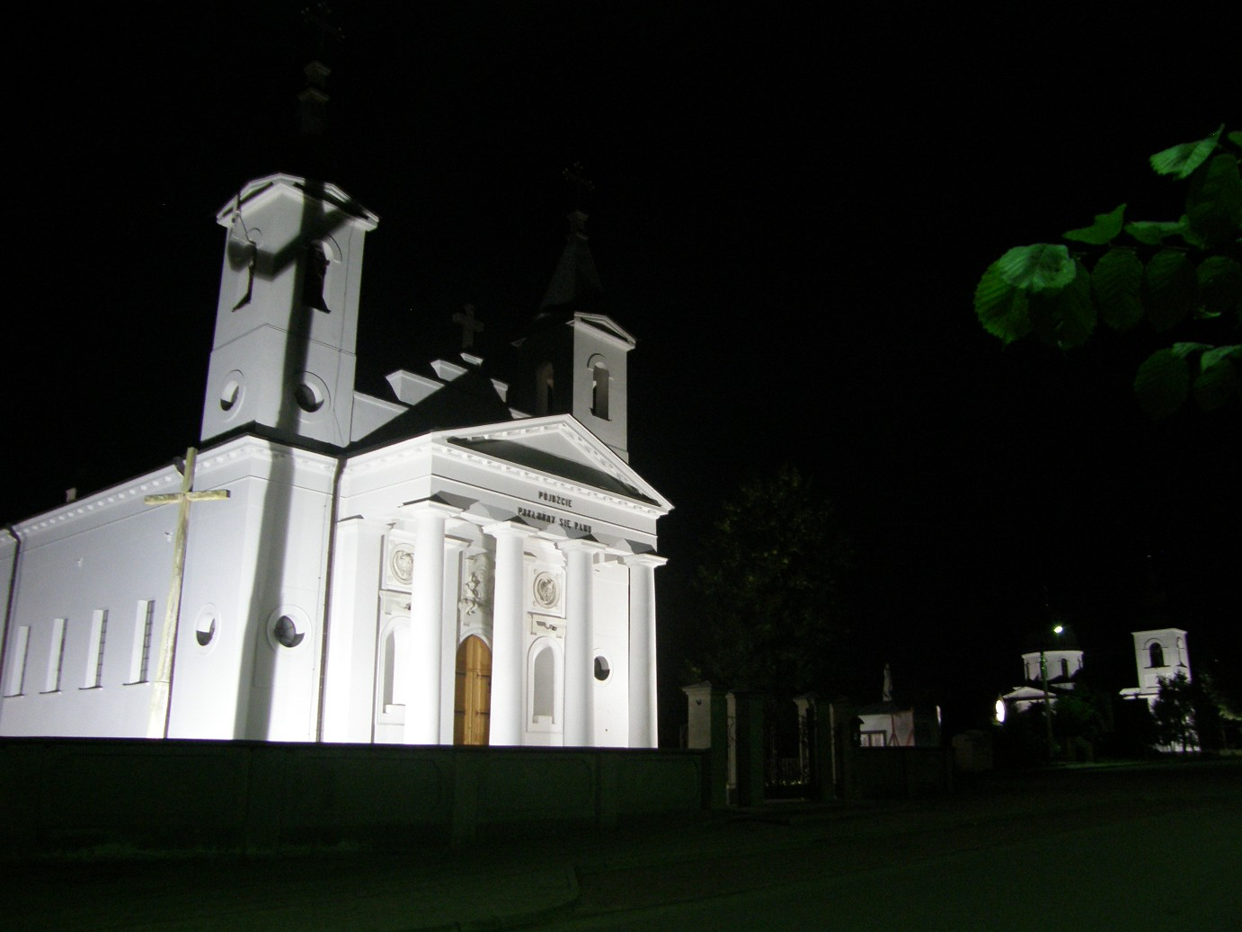 kościół nocą